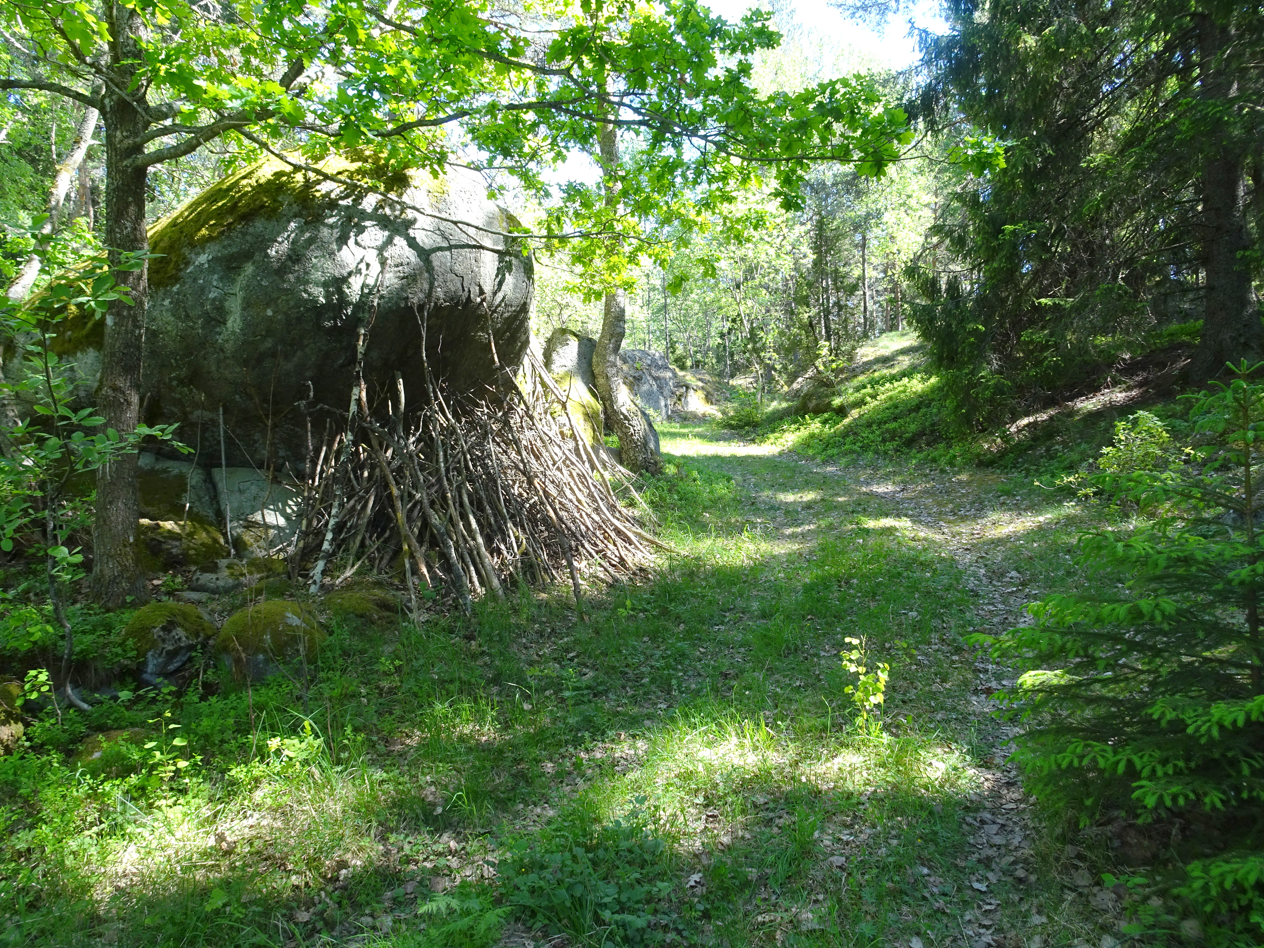 Stöttestenen vid gamla sockenvägen nära Stensättra gård i Huddinge